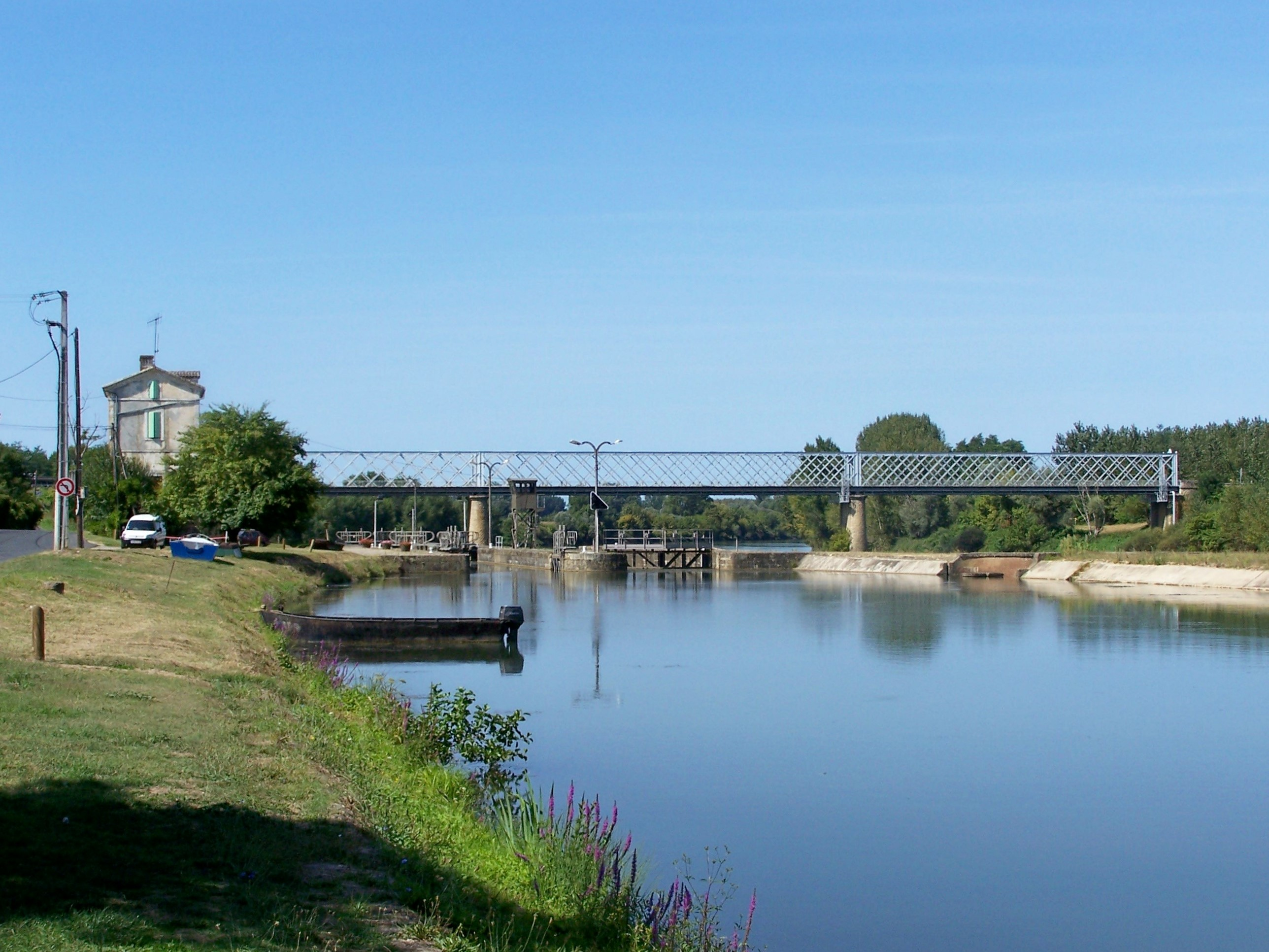 L'écluse n° 53 et le pont Eiffel à Castets-en-Dorthe, Gironde, France